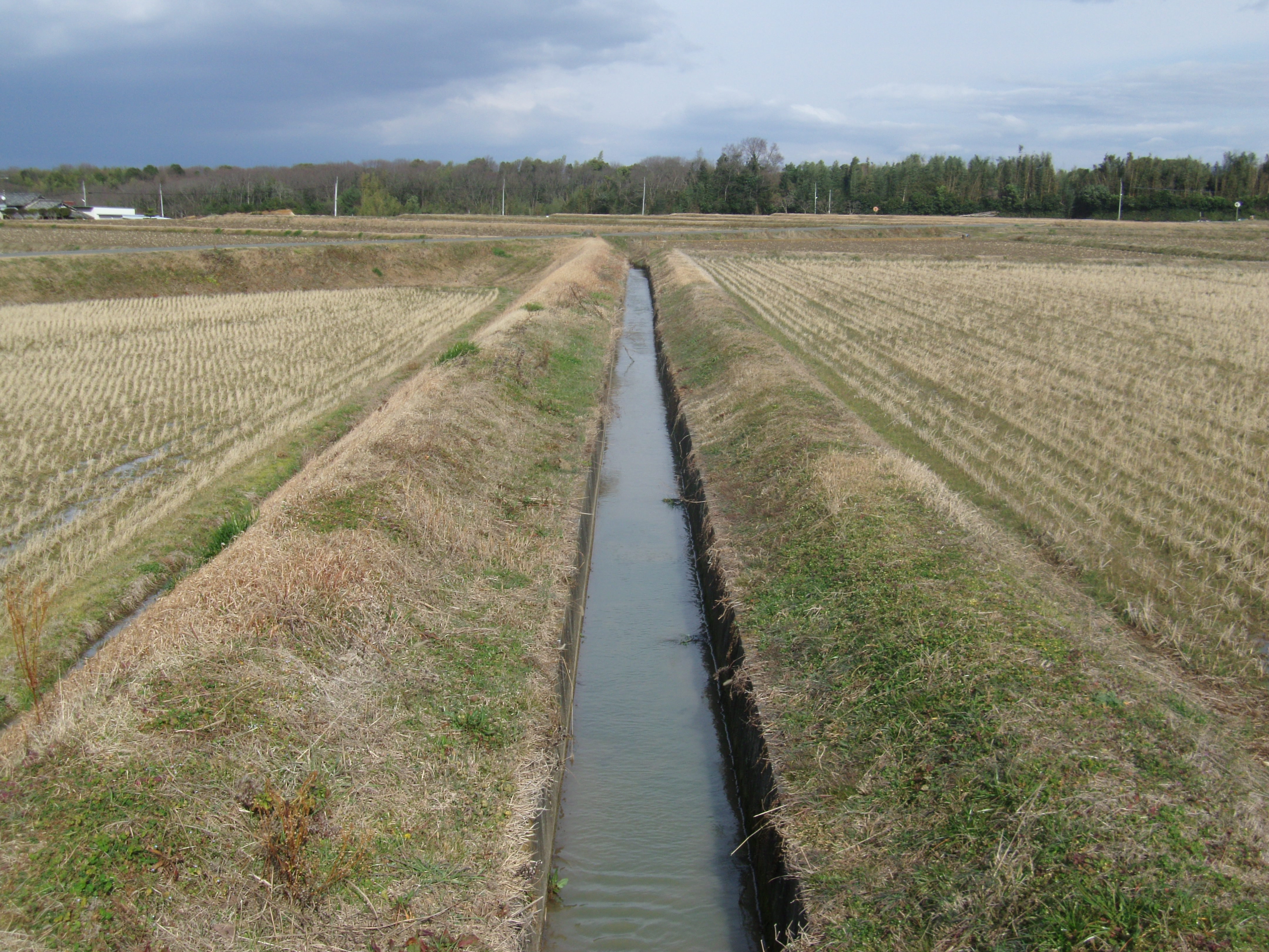 田園地帯を流れる淡河疎水と山田川疎水の合流幹線